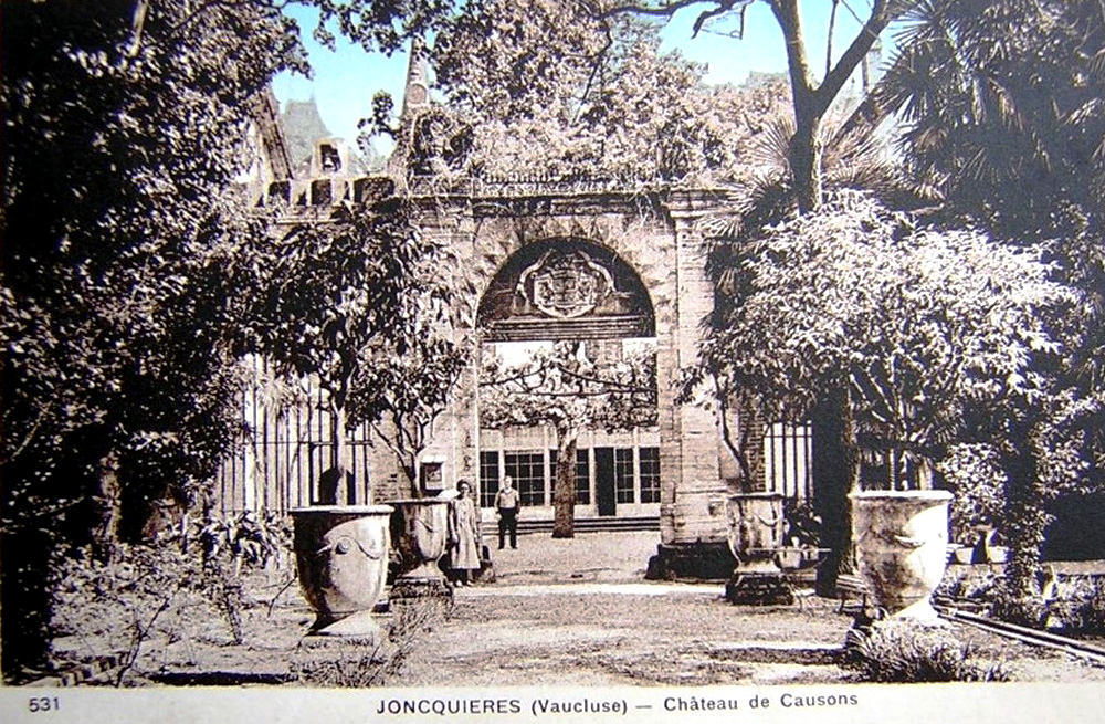 Château de Causans à Jonquières